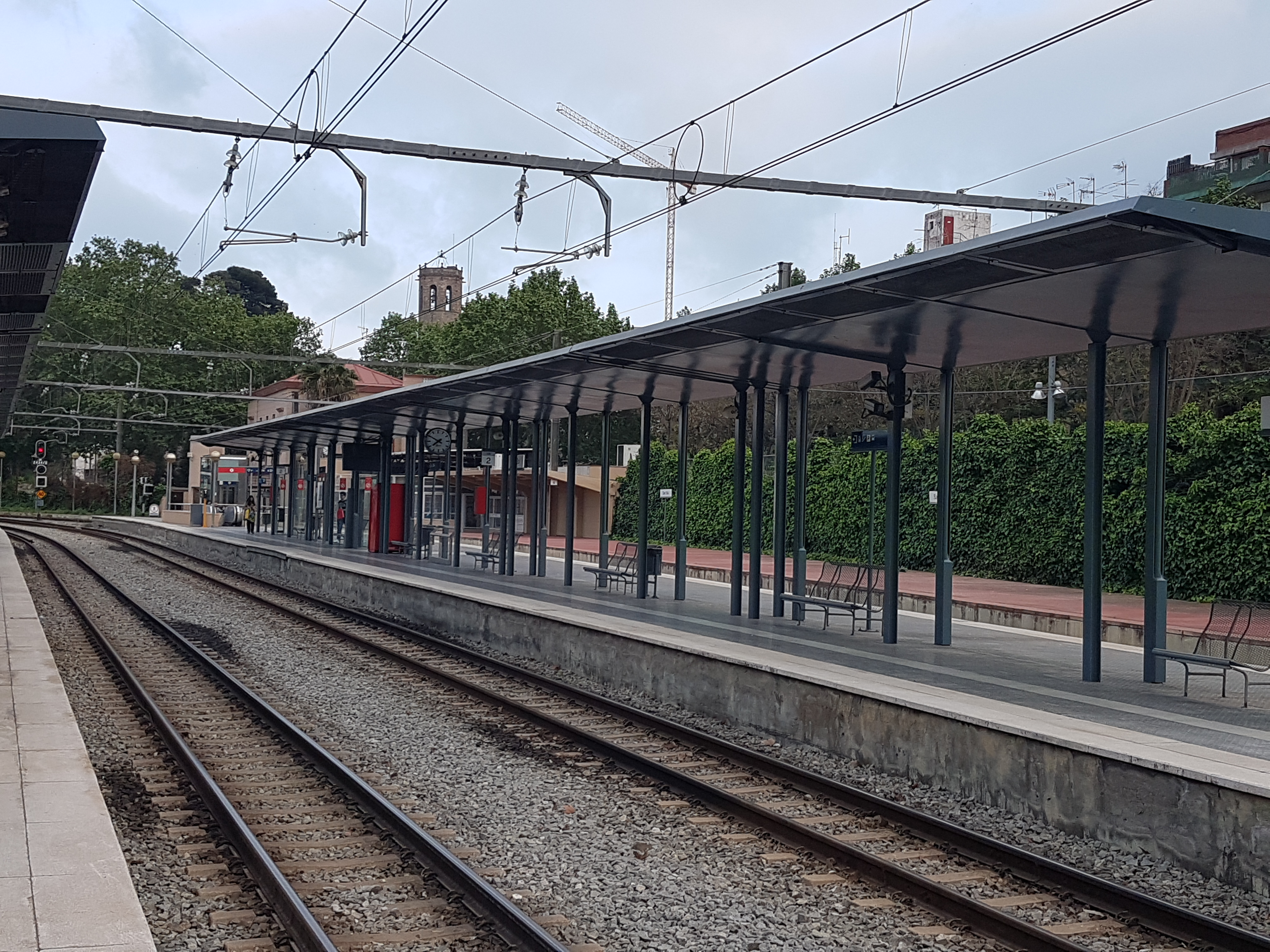 Vista de l'estació de Sant Boi de la línia Llobregat-Anoia de FGC